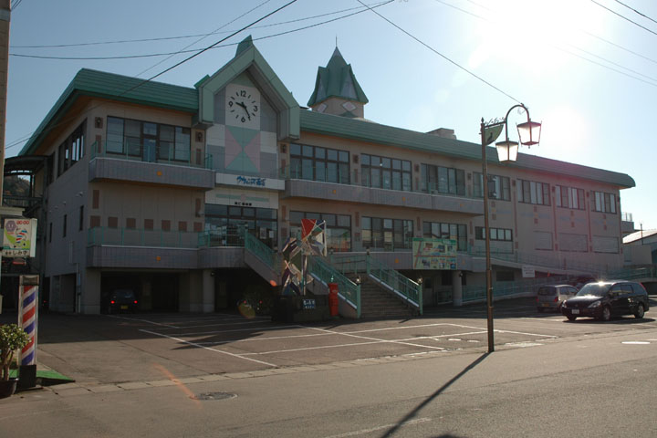 Ani-Maeda Station, on the Akita Nairiku Jūkan Railway Akita Nairiku Line, Kitaakita, Akita, Japan